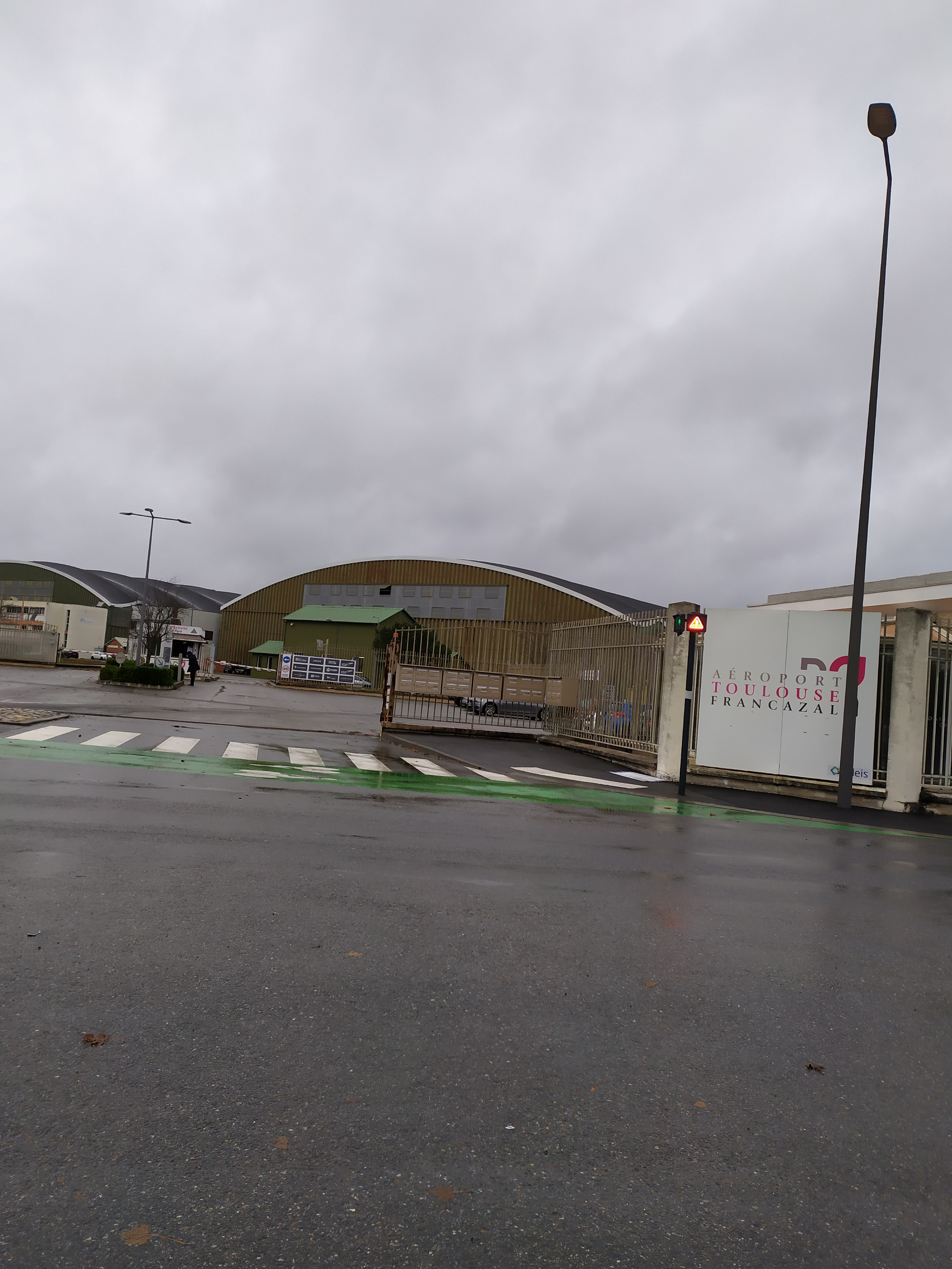 Entée de l'aéroport de Toulouse Francazal